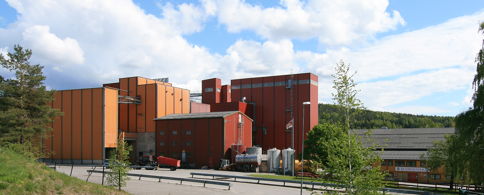 Strand Brenneri, Moelv.